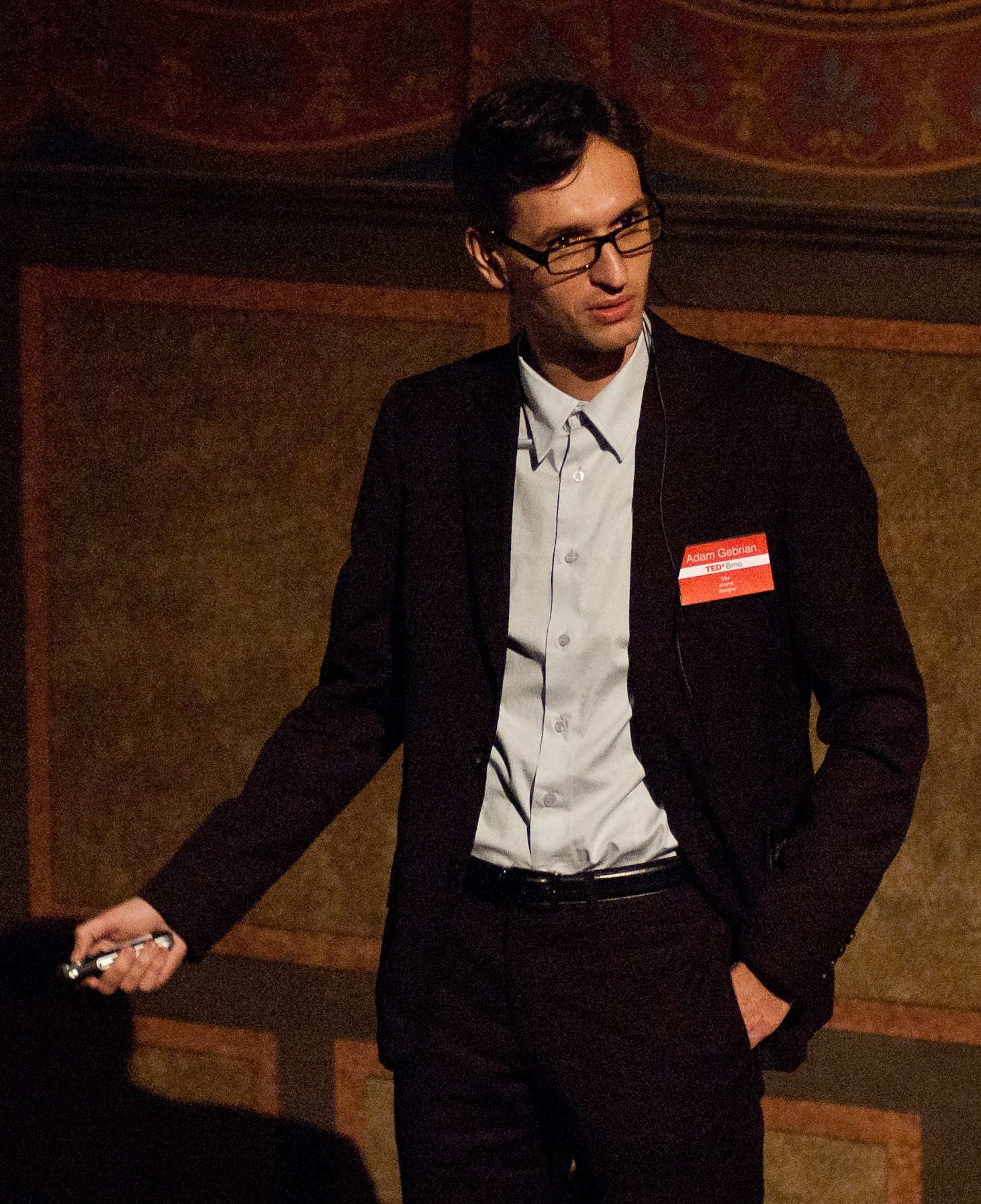 Český architekt Adam Gebrian během své přednášky na TEDxBrno (výřez)